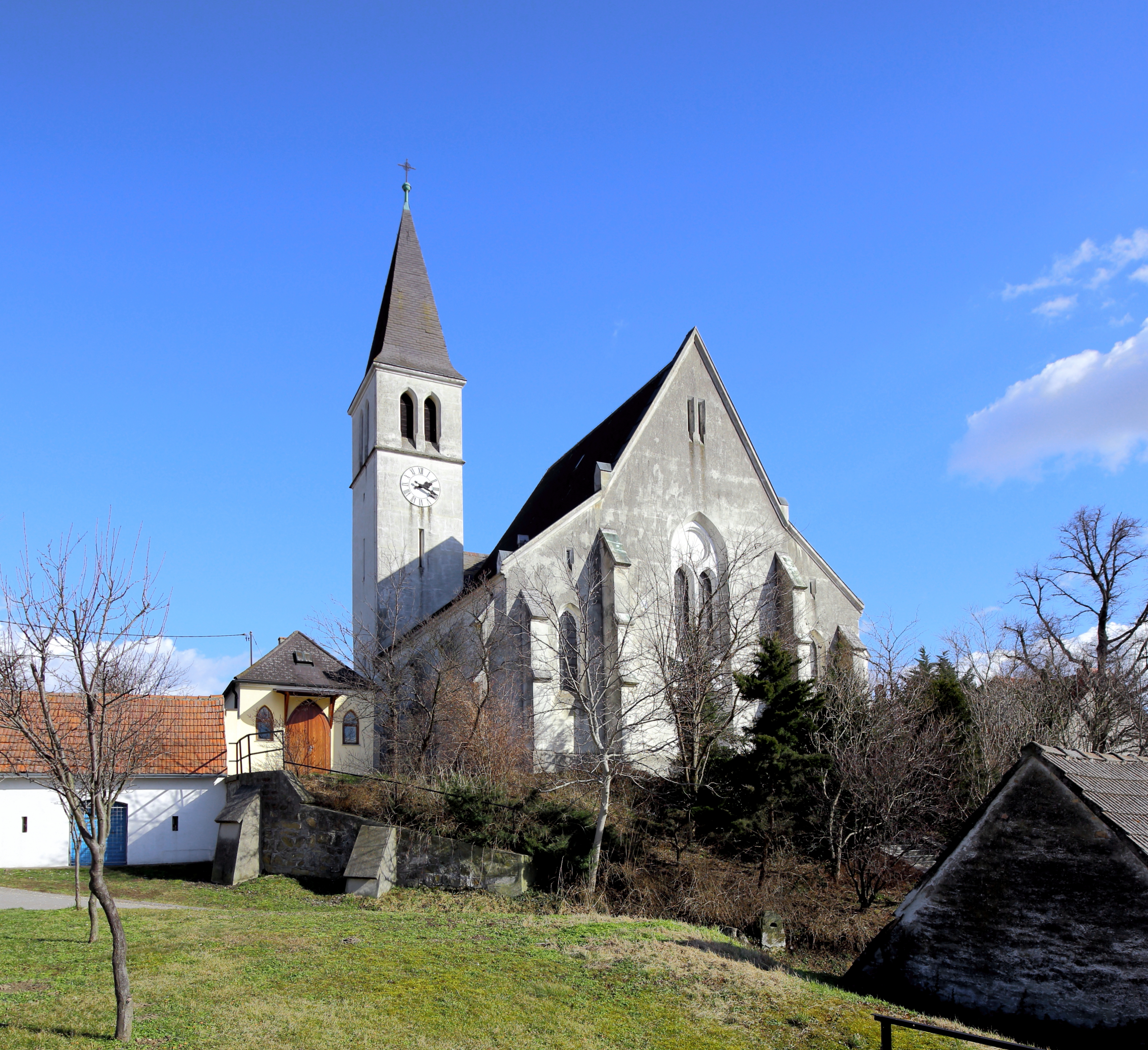 Westansicht der katholischen Pfarrkirche hl. Ulrich in der niederösterreichischen Gemeinde Stetten.